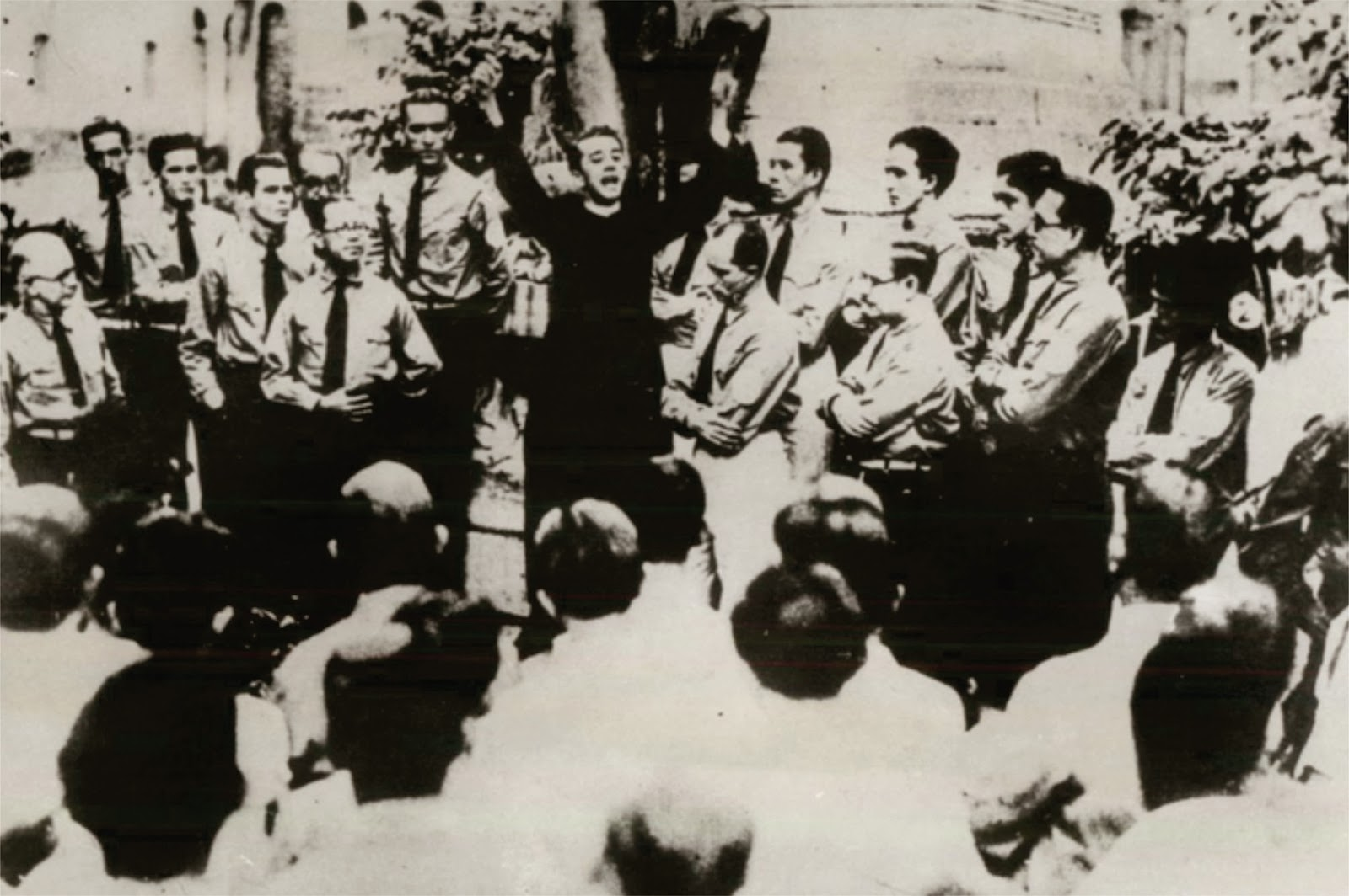 “Dom Helder Câmara, cercado por seus companheiros do Agrupamento [da Ação Integralista Brasileira] de Belém, fala ao povo, ao pé da estátua do Dr. Gama Malcher, Praça Visconde do Rio Branco, domingo, 4 março, 1934. À direita do orador, Prof. Paulo Eleutherio tendo à sua esquerda 1º tenente Oswaldo Palma Lima e o comandante da milícia integralista 1º tenente Altevir Soares”. (Descrição do verso da foto)